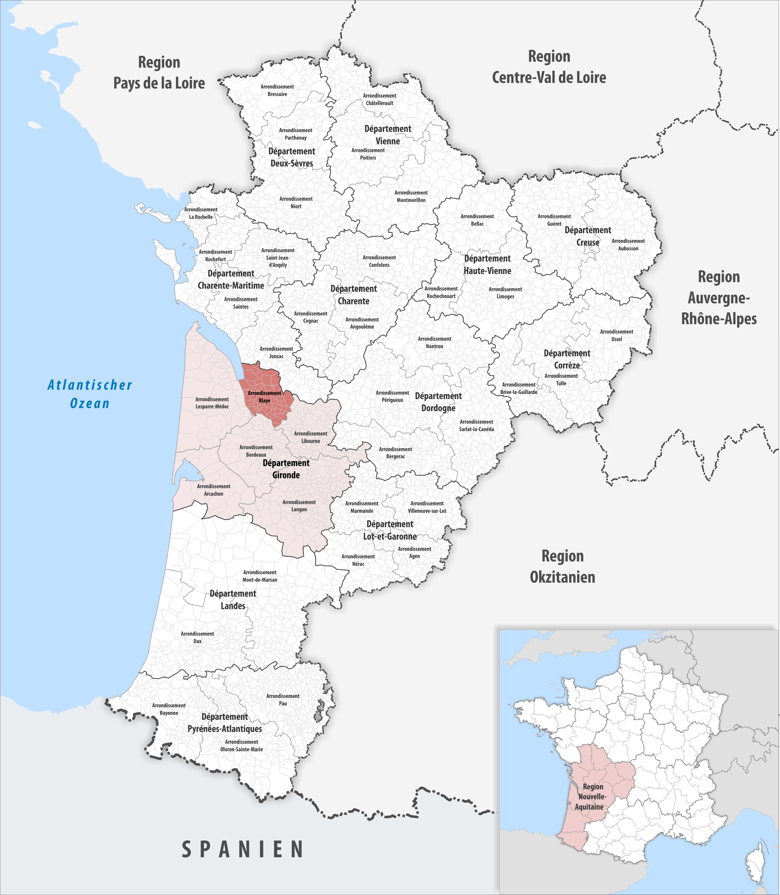 Lage des Arrondissements Blaye